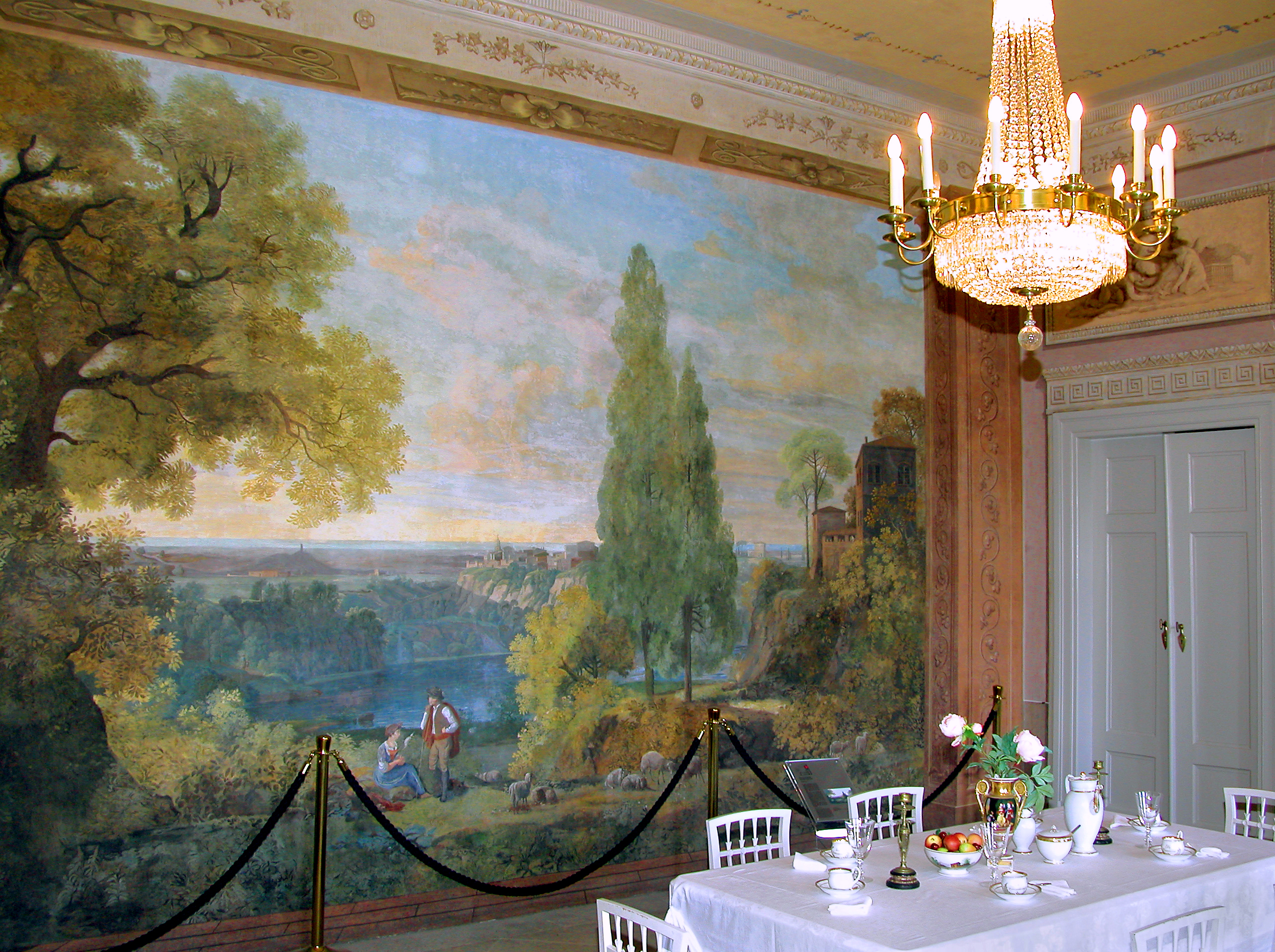 01.09.2009 04654 Frohburg: Schloß. Die heutige Vierflügelanlage entstand durch stetige Um- und Ausbauten infolge mehrfachen Besitzerwechsels aus einer mittelalterlichen Burganlage (um 1200). Den Steinsaal gestaltete der Landschaftsmaler Carl Ludwig Kaaz um 1805 mit einem monumentalen Wandbild. Es zeigt die Landschaft um den Nemisee (Lago die Nemi) in Mittelitalien. [DSCN38700.TIF]20090901130DR.JPG(c)Blobelt